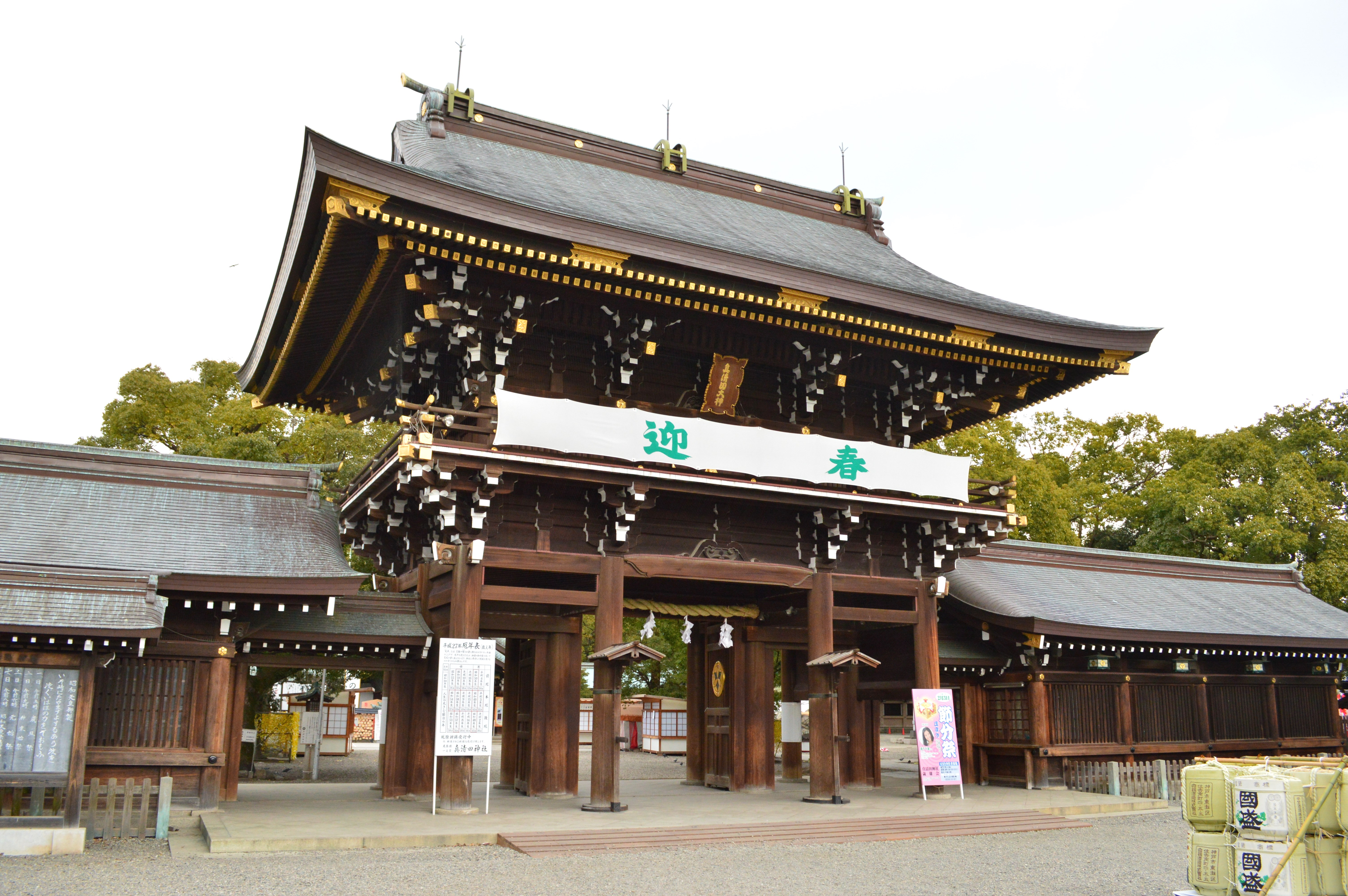 真清田神社 楼門